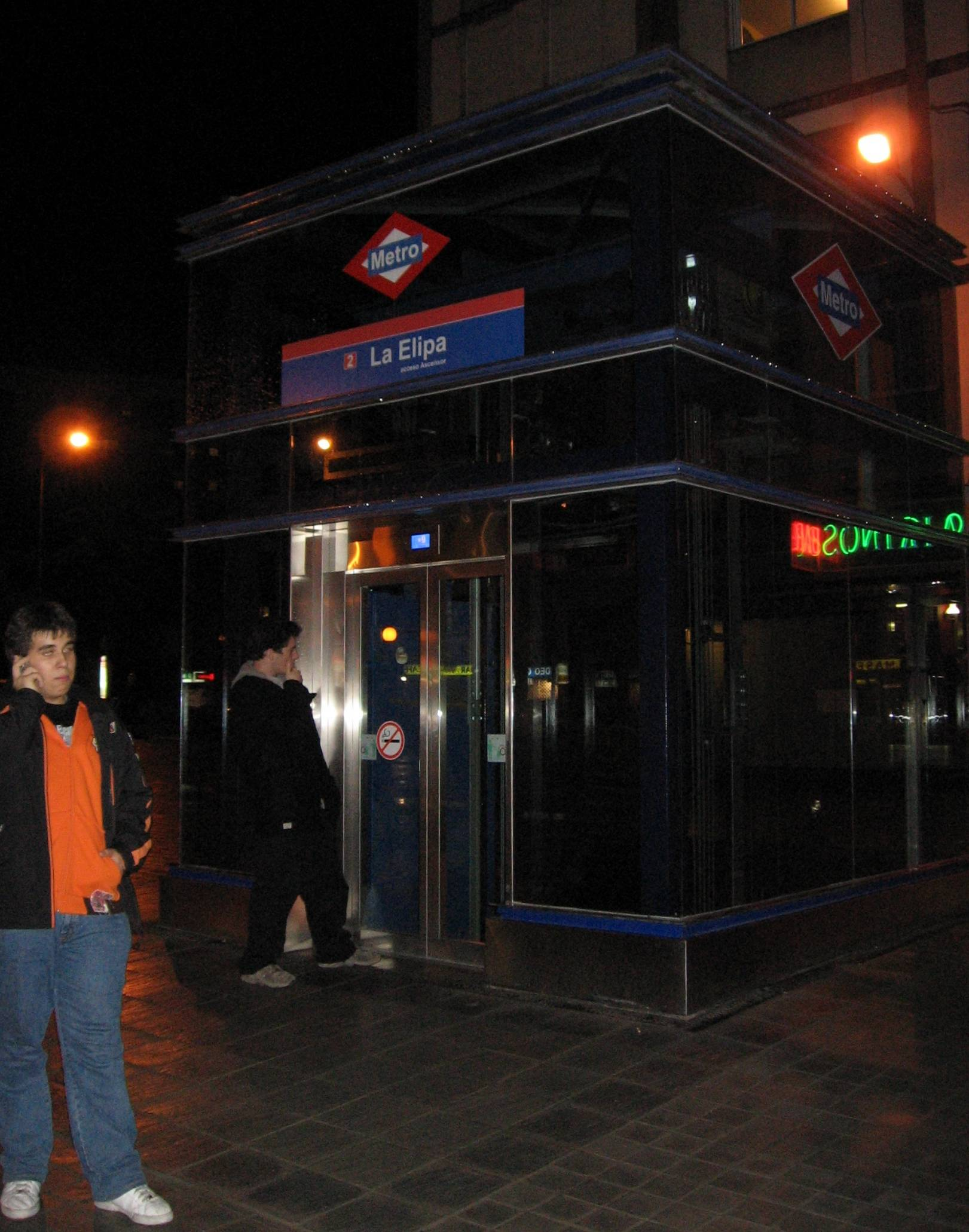 People walking at La Elipa